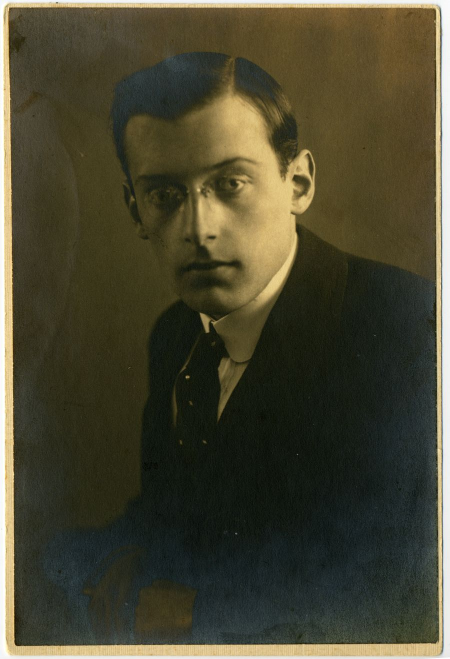 פאול בן-חיים בצעירותו, 1914 (מס' קטלוגי: MUS 055 / M1-28)